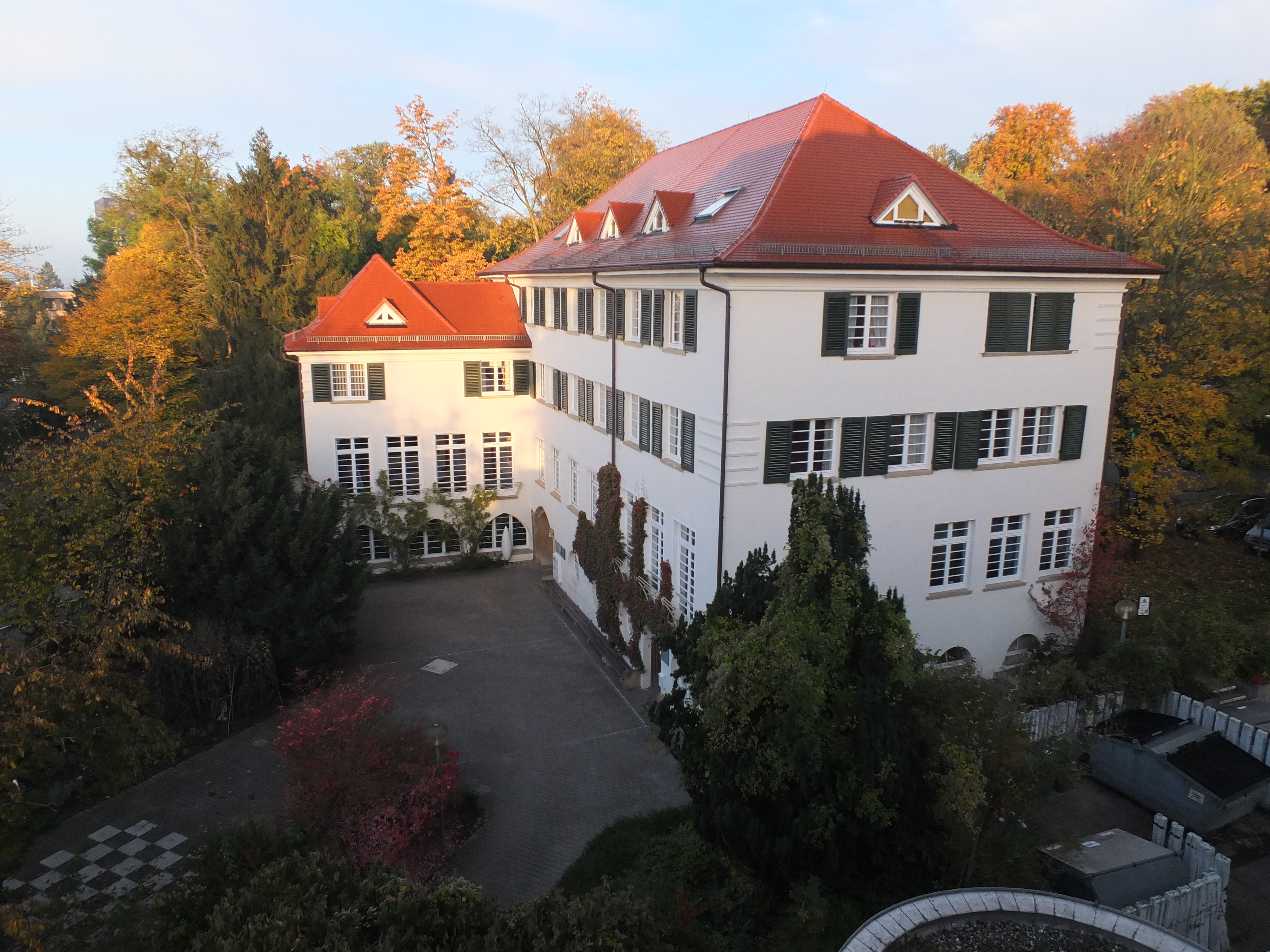 Das Brüderhaus der Karlshöhe Ludwigsburg. Heute befindet sich neben Seminarräumen und einem Andachtsraum, die Geschäftsstelle des Diakonieverbandes im Haus.